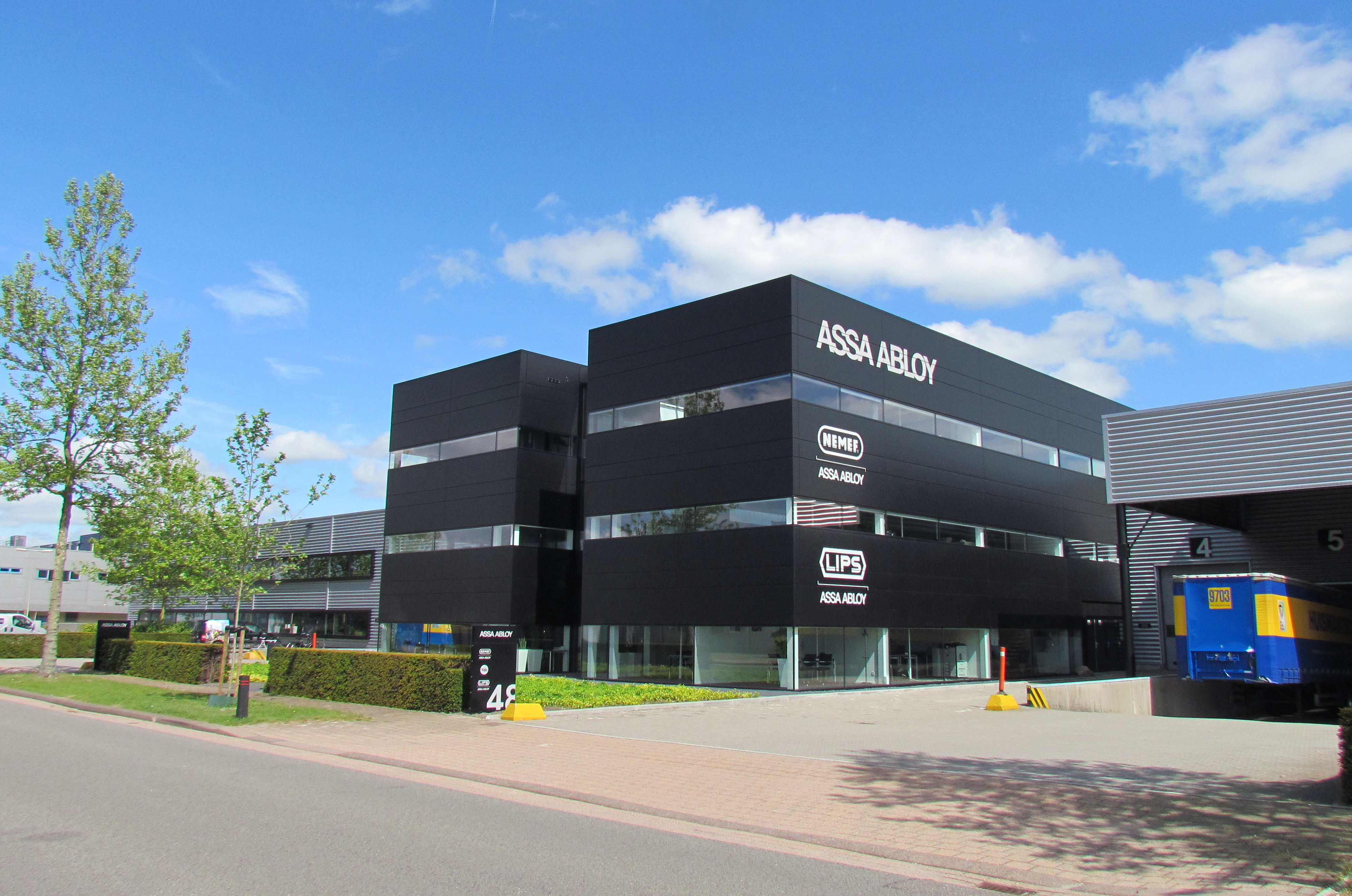 Vestiging van Assa Abloy/Nemef/Lips op bedrijventerrein Apeldoorn-Noord